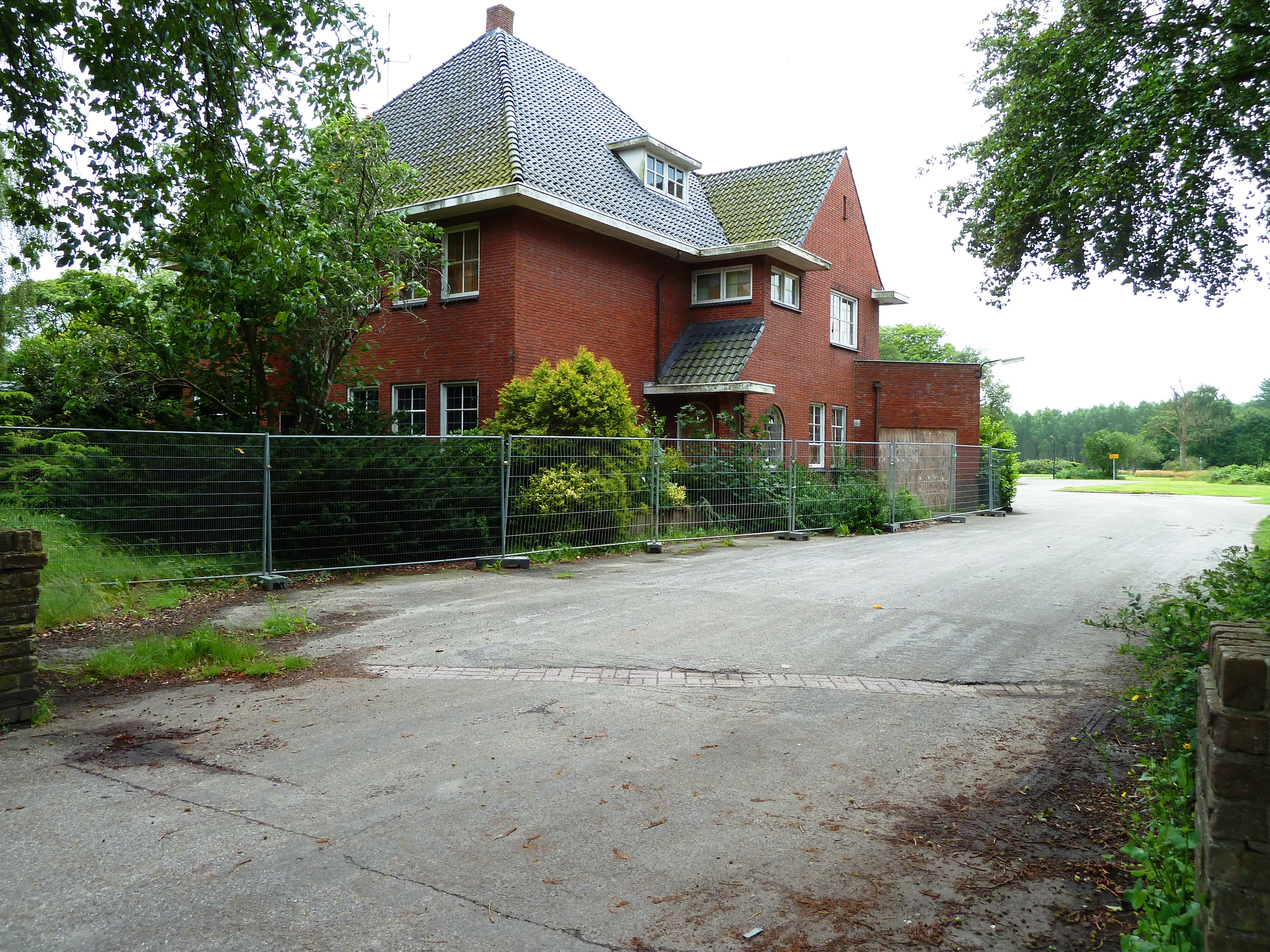 Het leegstaande en verpauperde voormalige hoofdgebouw van Groot Bronswijk.